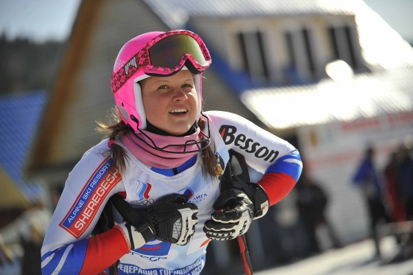 Кедрина Анастасия